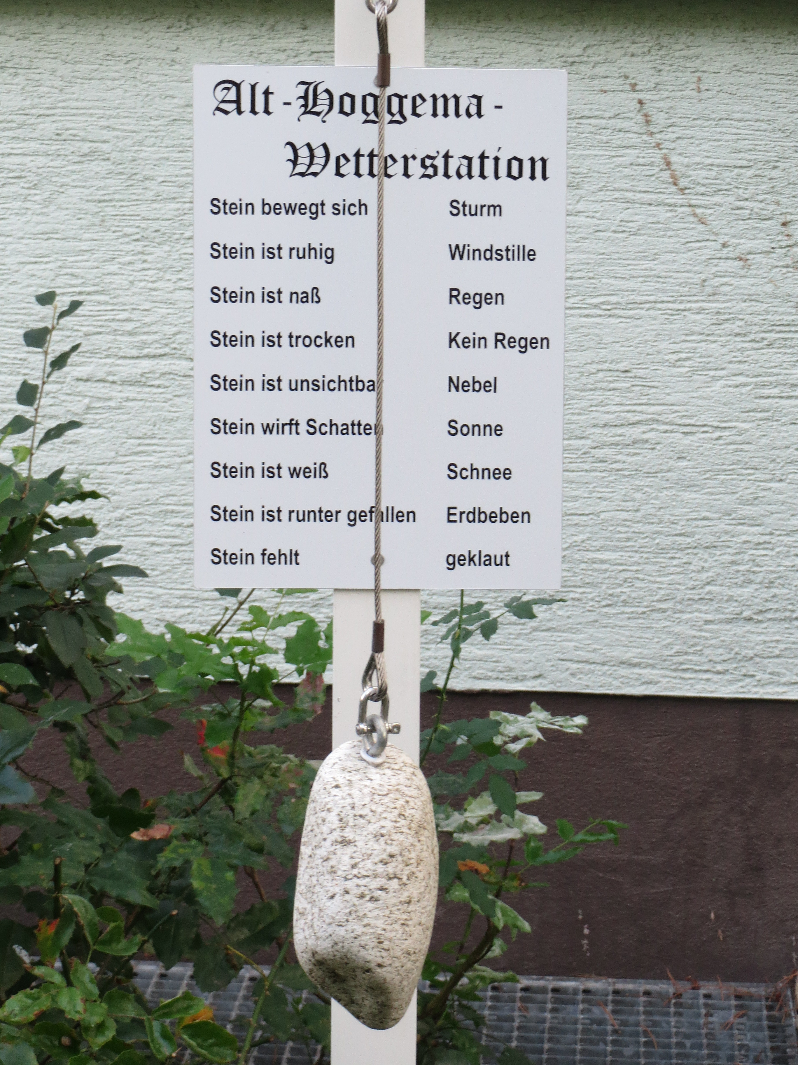 Hockenheimer "Wetterstation"